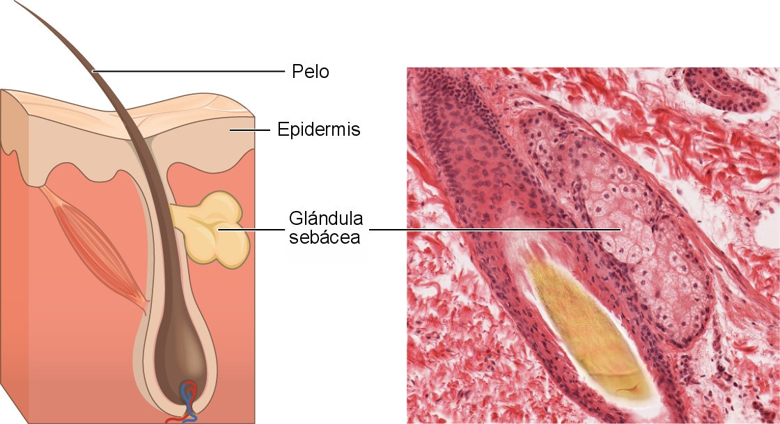 Esquema de la piel e imagen histológica en el la que son visibles diferentes estructuras cutáneas, entre ellas una glándula sebácea.